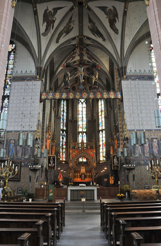 Altaar van de Basiliek O.L. Vrouw ten Hemelopneming in Zwolle. De 1e bouwfase van de kerk was van 1394-1417. Een 2e bouwfase van 1542-1454. De kerk is van 1591 tot 1811 voor niet-kerkelijke doeleinden gebruikt. In 1809 werd de kerk aan de katholieken teruggegeven. Bij een restauratie in de 19e eeuw kreeg de kerk een neogotisch interieur. Tussen 1976 en 1981 werden de zijbeuken weer verwijderd. Op 18 oktober 1999 verleende Paus Johannes Paulus II de kerk de eretitel ‘Basilica Minor’.